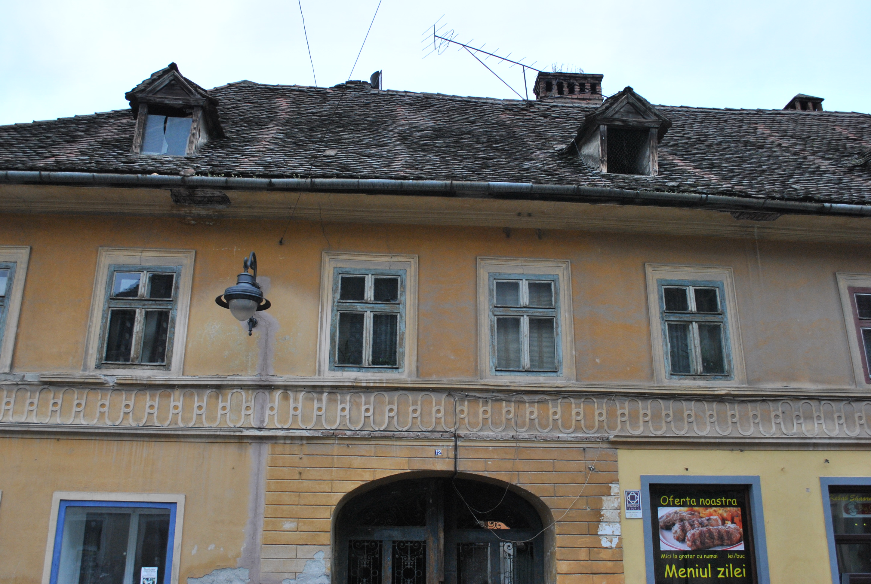 Casă, fragmente sec. XV - XVI, sec. XVIII; primul sfertalsec. XIX; 1875 - 1900; 1925 - 1950